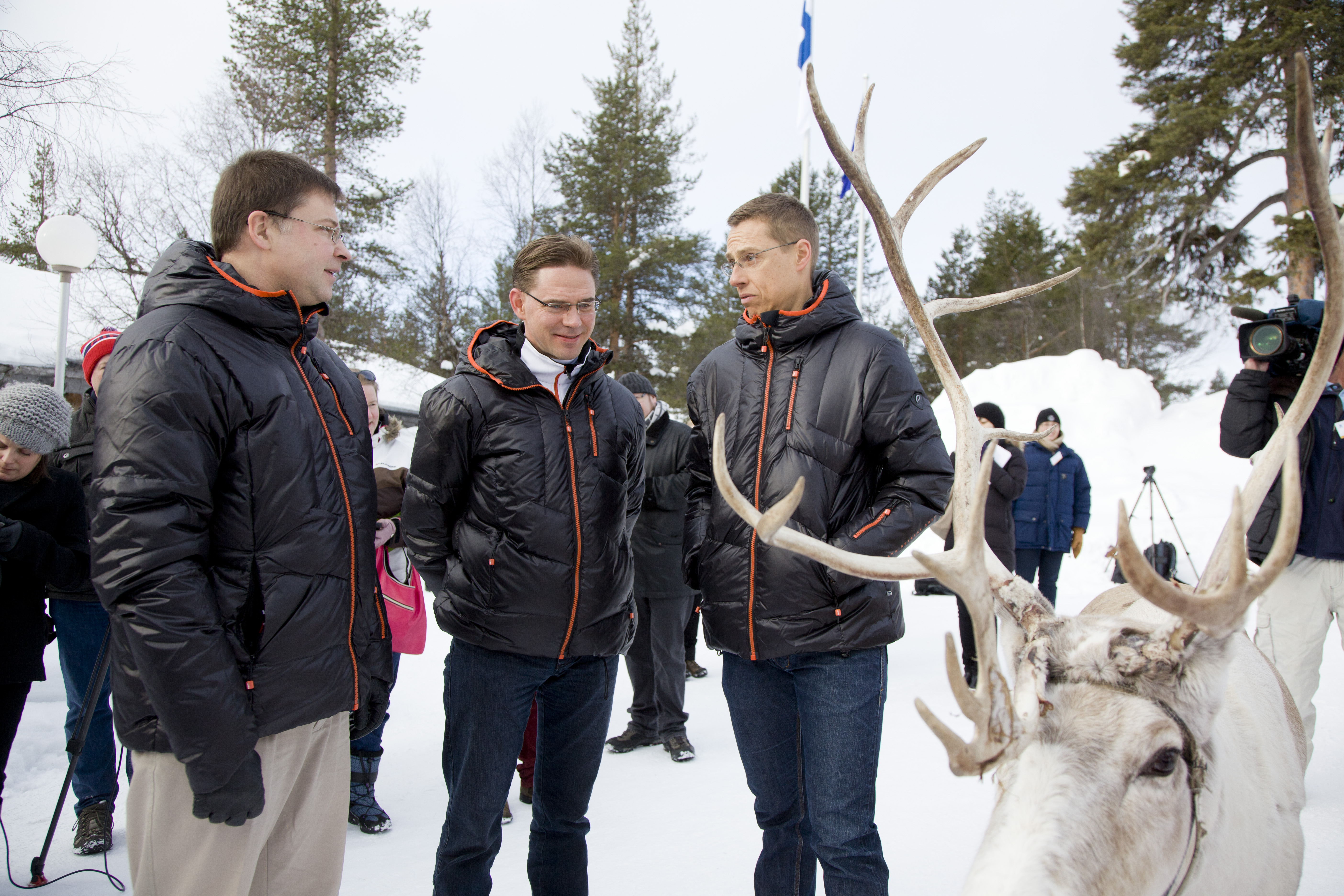 Ministru prezidents Valdis Dombrovskis Lapzemē piedalās Somijas premjera Jirki Katainena rīkotajā neformālajā Eiropas līderu sanāksmē, kurā tiks spriests par Eiropas integrācijas perspektīvām un izaicinājumiem. No kreisās: V.Dombrovskis, Somijas premjerministrs Jirki Katainens un Somijas Eiropas lietu un ārējās tirdzniecības ministrs Aleksandrs Stubs. Foto: Eero Kuosmanen/Finnish Prime Minister’s Office